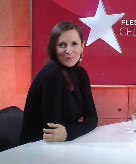 Polska aktorka Anna Kerth na planie programu "Flesz Celebrycki Extra" w 2016 roku.